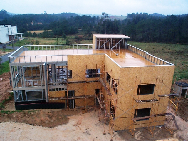 Estrutura de edifício em Light Steel Framing parcialmente revestido com OSB.